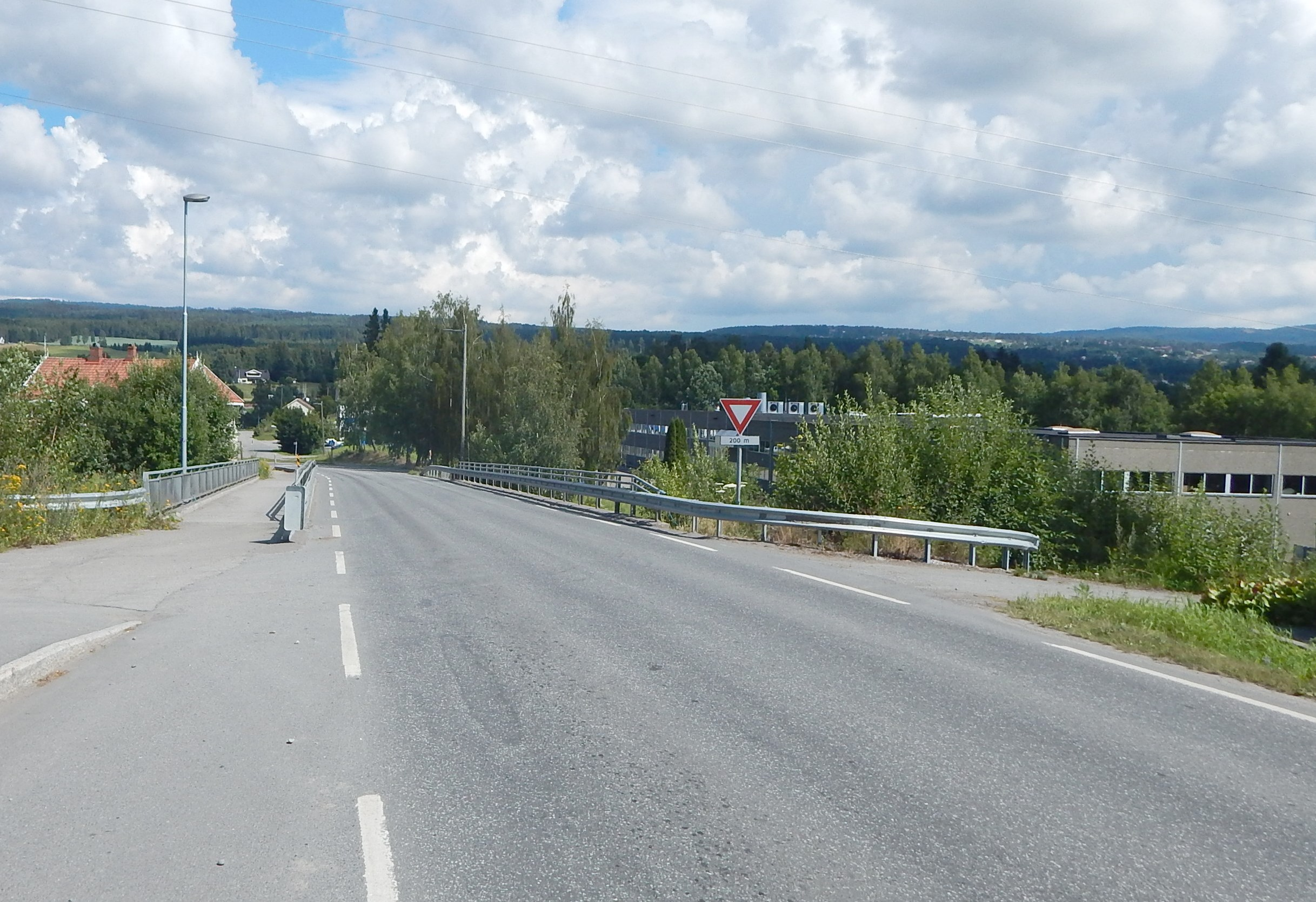 Brandbuenden av Grinakerlinna går på bro over fylkesvei 34.